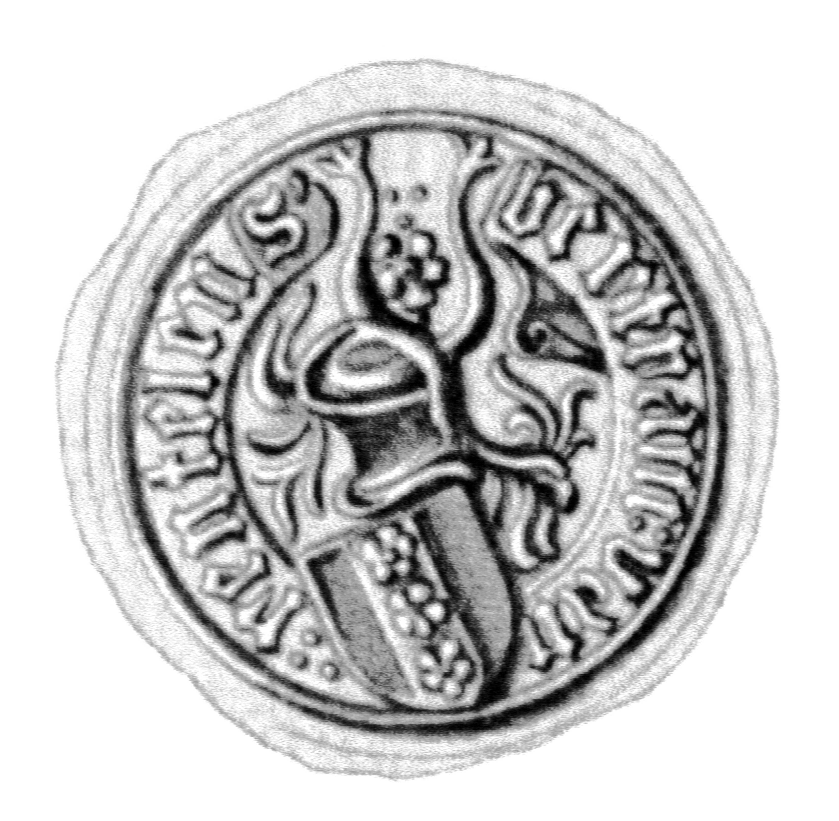 Siegel des Ratsmannes Bertram von Rentelen. Das Siegel stammt aus der Zeit um 1478.Siehe Emil Ferdinand Fehling: Lübeckische Ratslinie, Nr. 561 (Bertram Rentelen). Er war 1461-68 Hauptmann des Lübecker Rates auf Fehmarn.